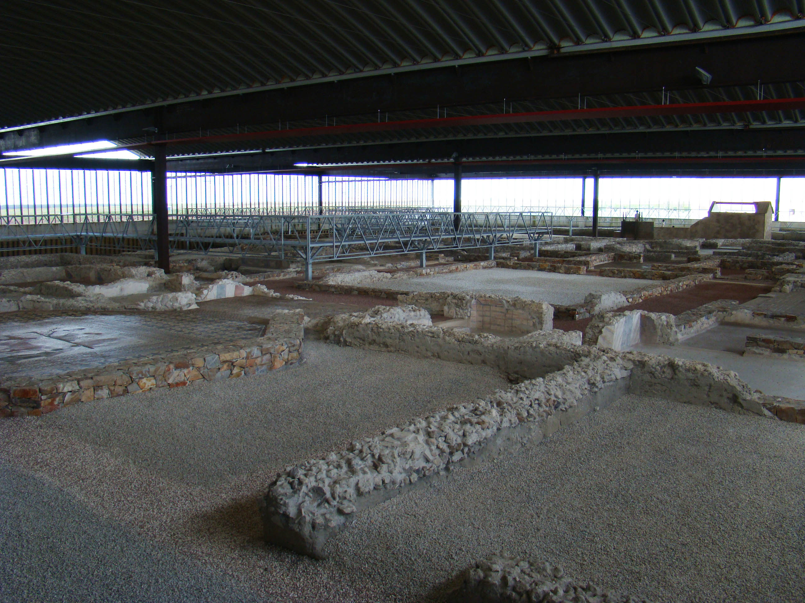 Villa romana de Almenara de Adaja, provincia de Valladolid (España). Vista parcial del yacimiento.